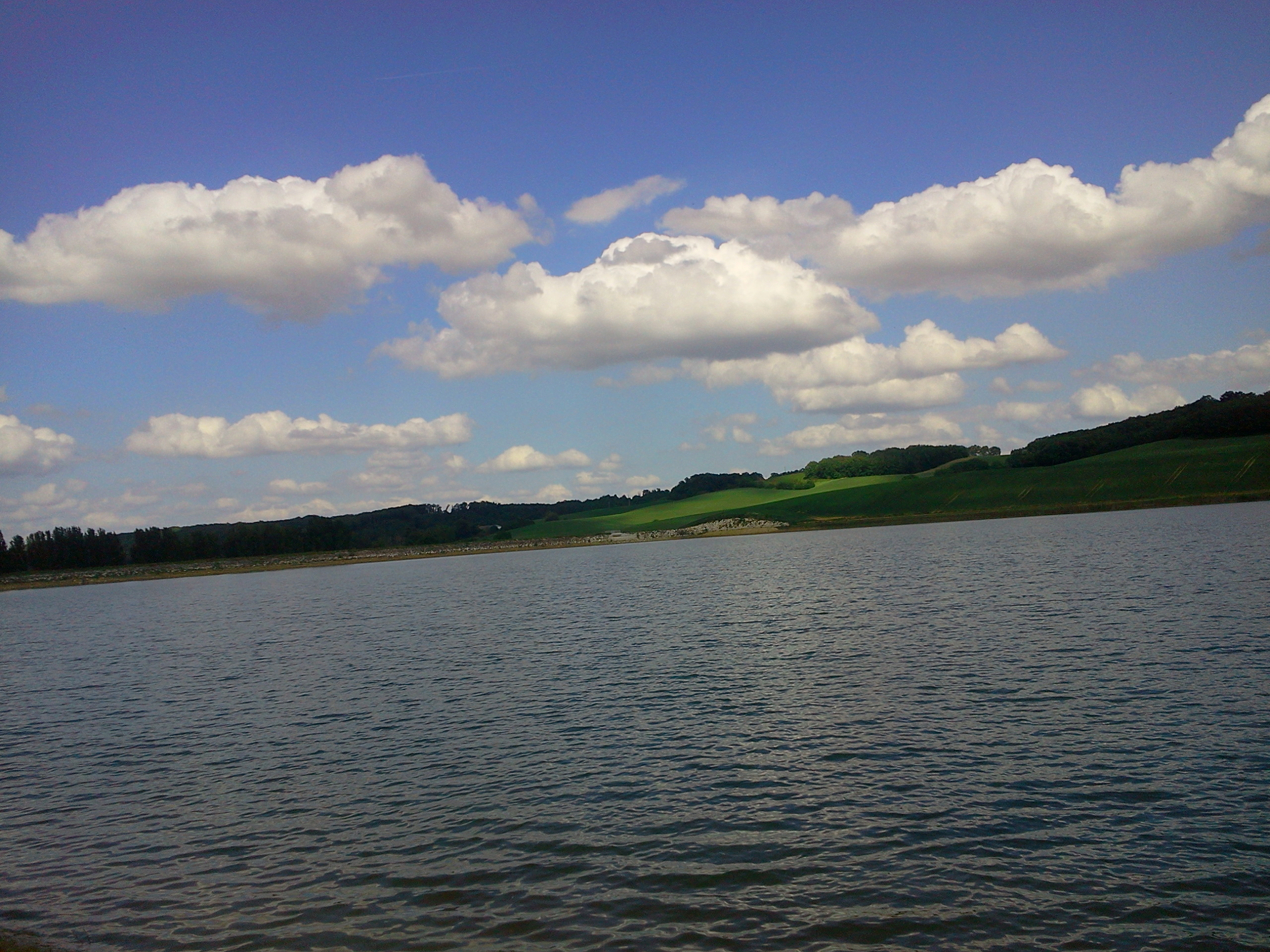 82500 Gariès, France